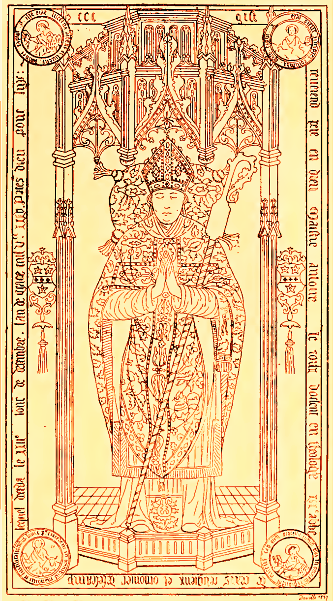 Abbaye Saint-Georges de Boscherville, Pierre tombale d'Antoine Le Roux (image du domaine public modifiée)